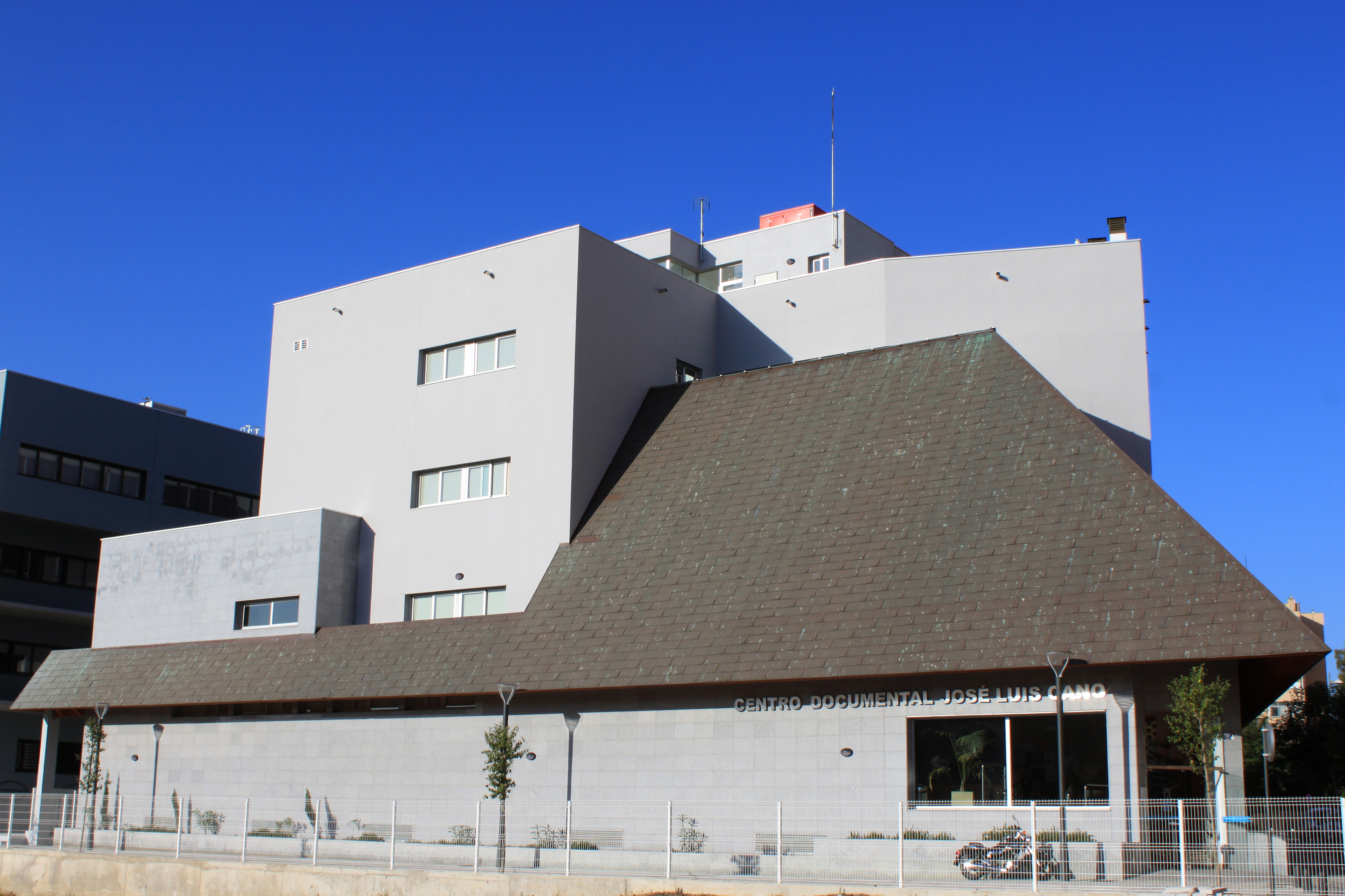 Centro Documental José Luis Cano de Algeciras, Andalucía, España.